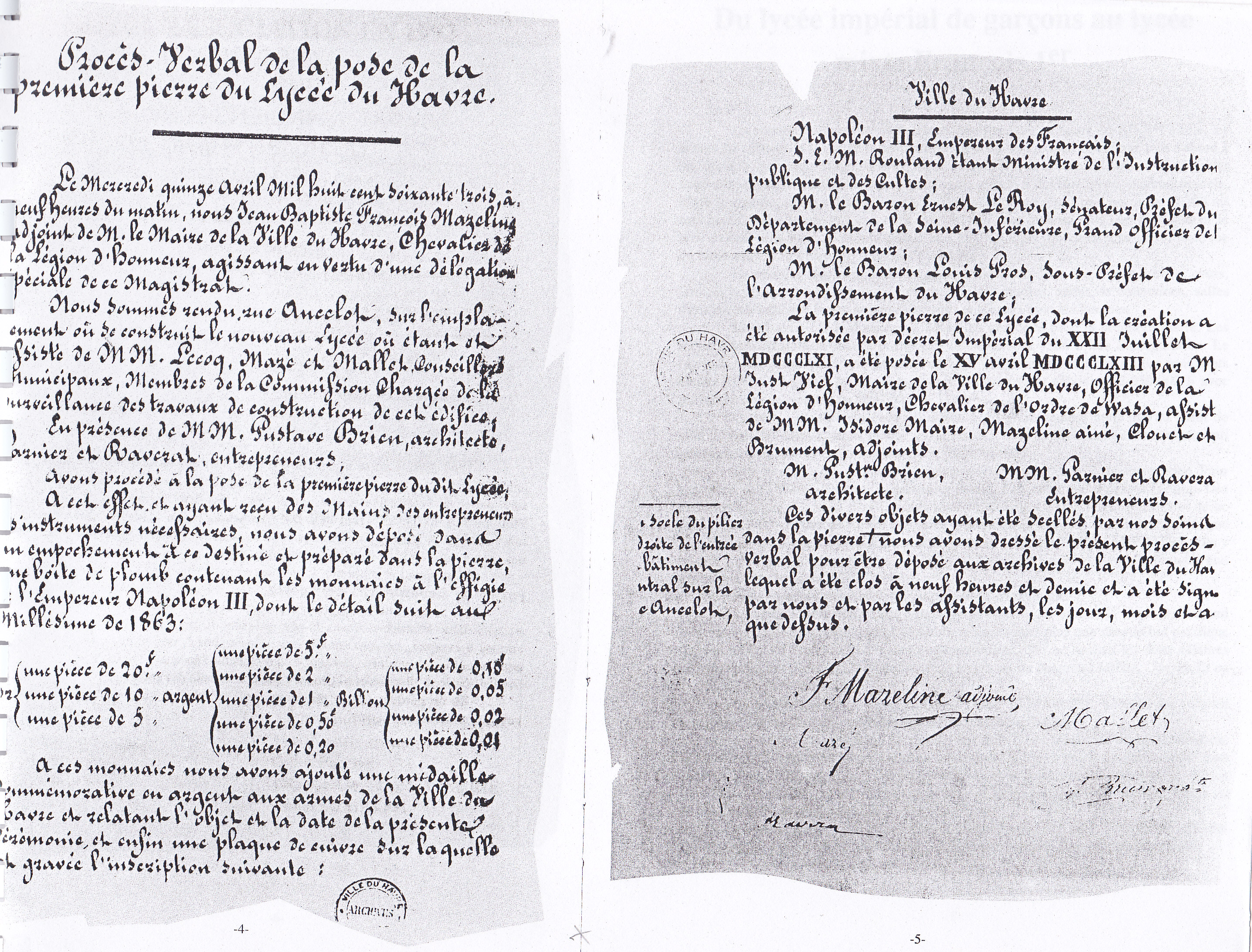 Acte de fondation du lycée François 1er